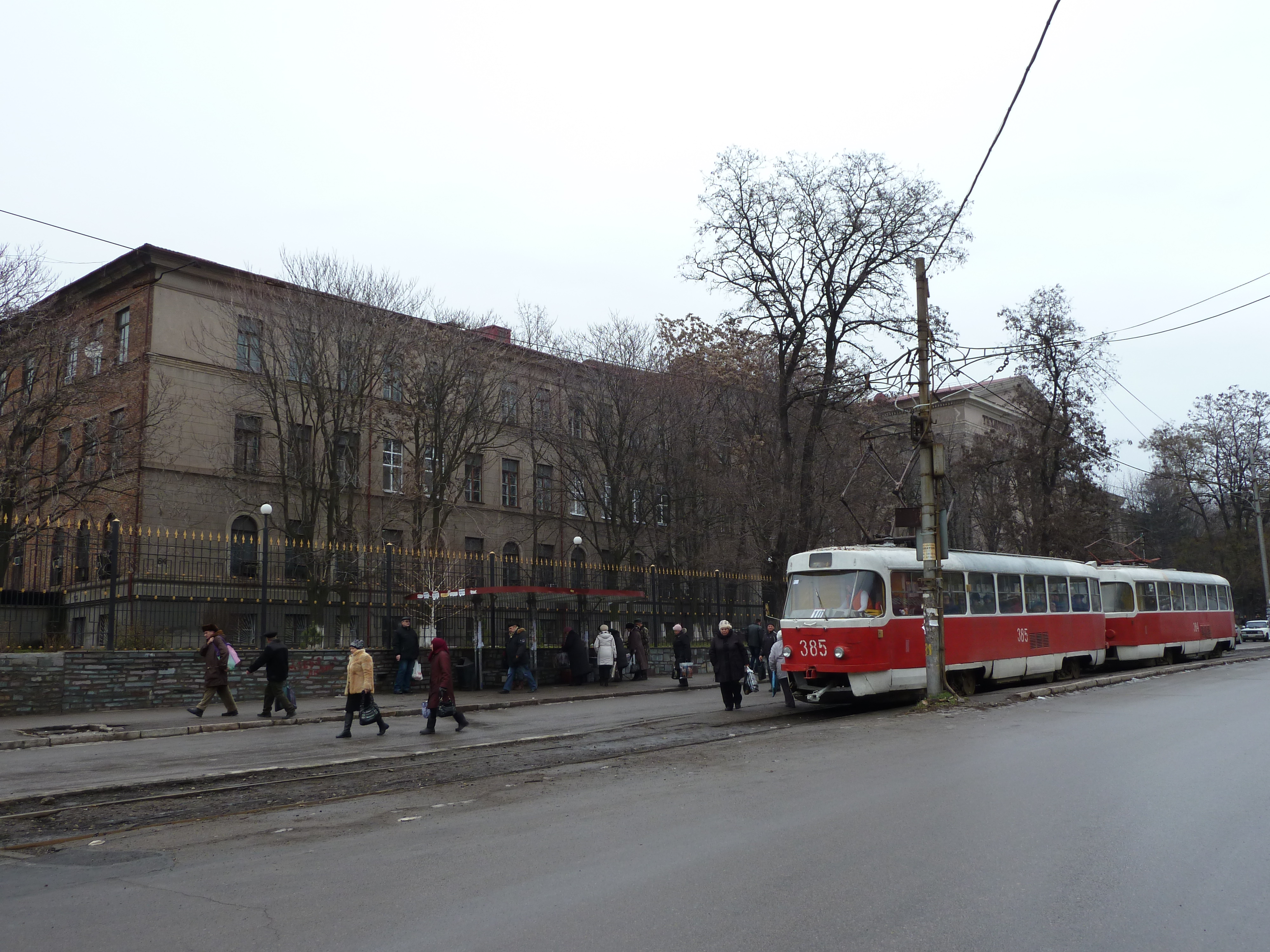 Трамвай на улице Жуковского, Запорожье